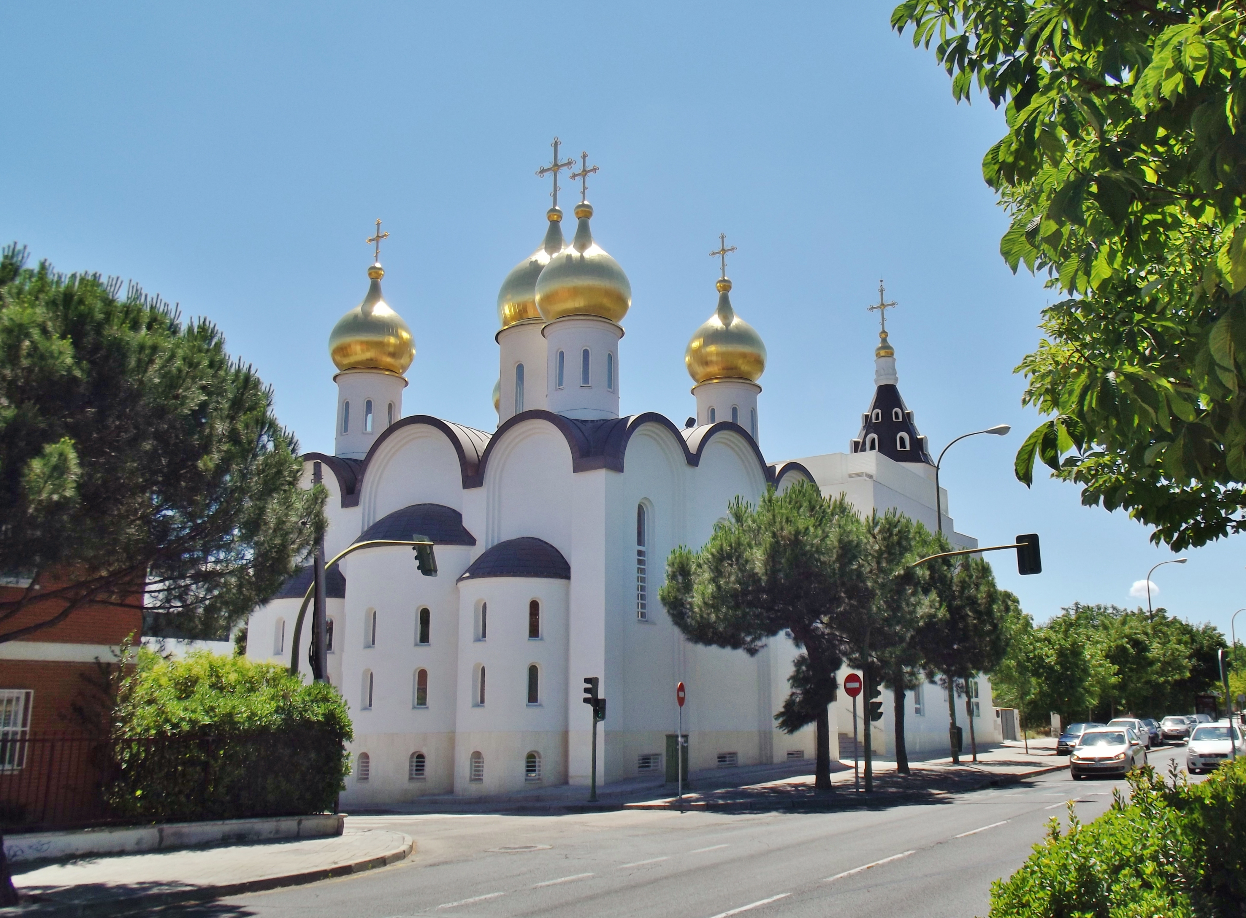 Iglesia ortodoxa de Santa María Magdalena, Madrid.